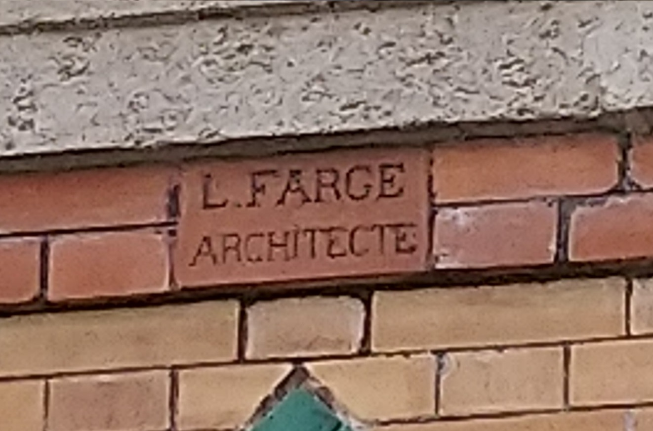 Ladrillo-firma del arquitecto de la estación de Almería